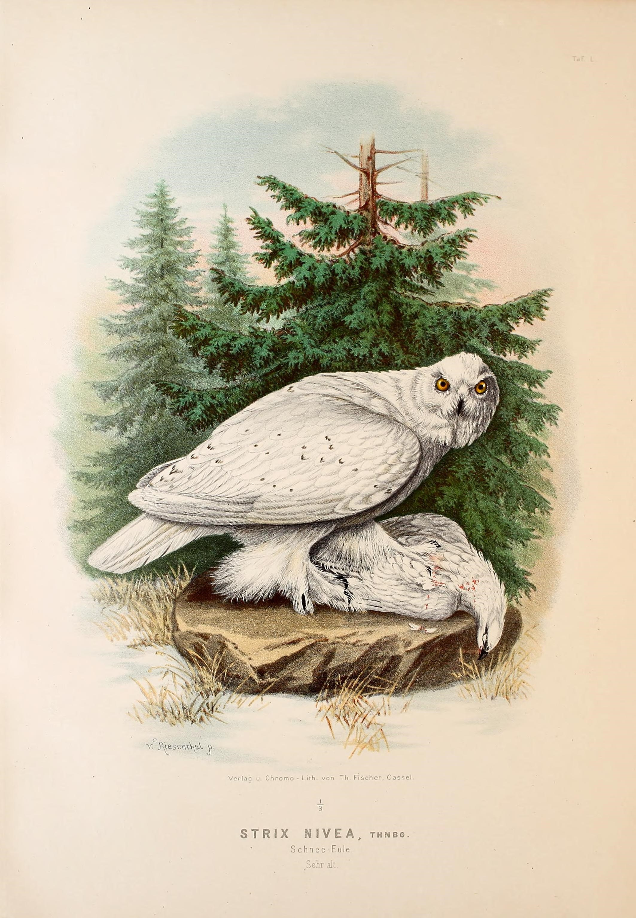 STRIX NIVEA, thnbg. Schnee-Eule. .Sehr alt.